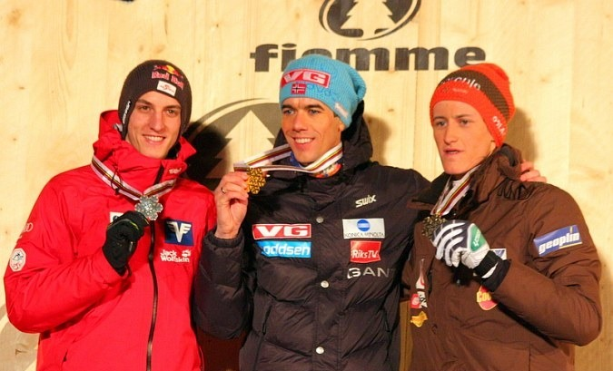 Gregor Schlierenzauer, Anders Bardal i Peter Prevc podczas dekoracji medalistów konkursu indywidualnego mężczyzn na skoczni normalnej (Mistrzostwa Świata 2013, Val di Fiemme).